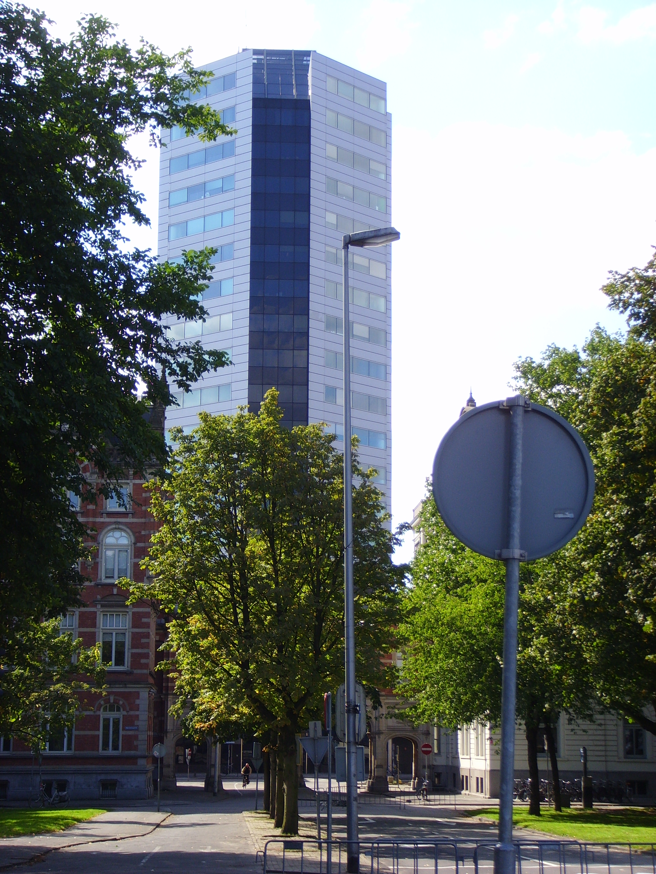 Hoofdkantoor van de Nederlandse Spoorwegen in het Stationsgebied Utrecht, gezien vanaf de Catharijnebaan